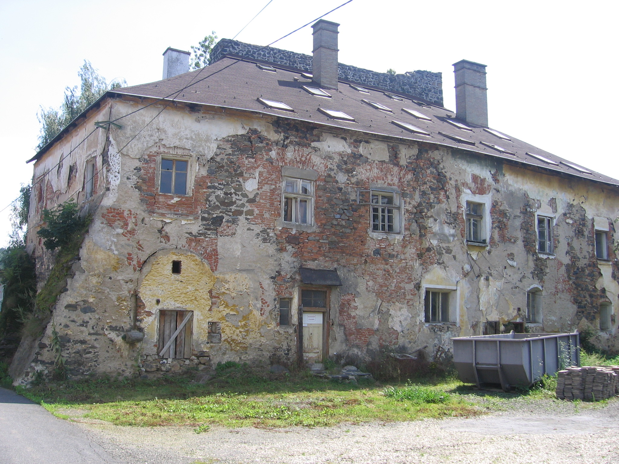 Tvrz v Dolanech, Dolany 2, okr. Klatovy